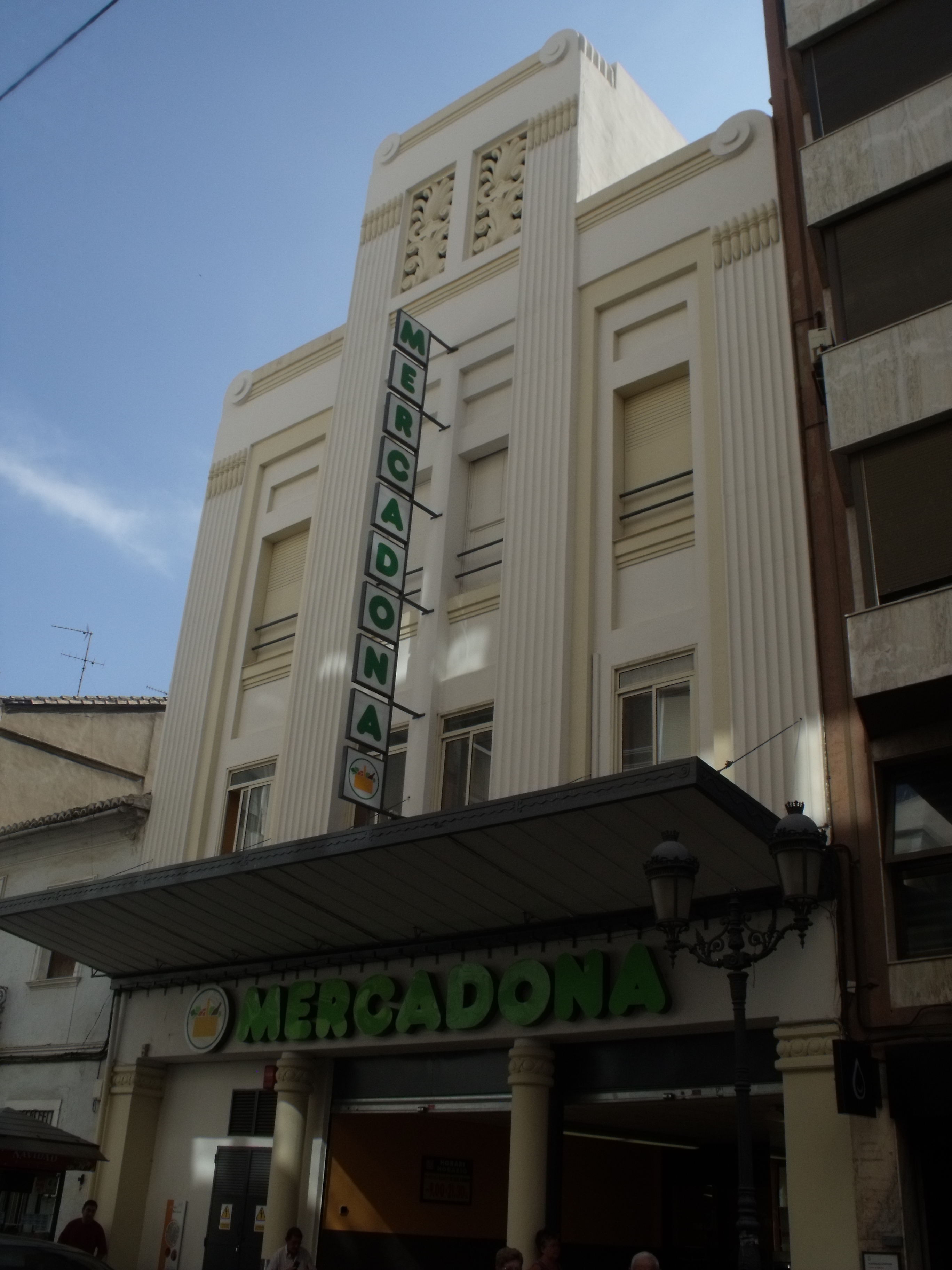 Vista general